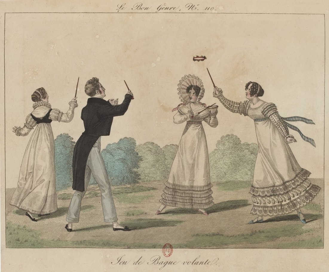 "(Année 1819) Adopté par les Parisiens, le jeu créole ou de bague volante ne pouvait manquer d’être embelli : ils ont d’abord recouvert d’un ruban le jonc qui forme la bague, puis placé sur le cercle autant de rosettes qu’il y avait de grelots." (Pierre de La Mésangère, Observations sur les modes et les usages de Paris , pour servir d'explication aux 115 caricatures publiées sous le titre de Bon genre depuis le commencement du dix-neuvième siècle, 1827, page 24)